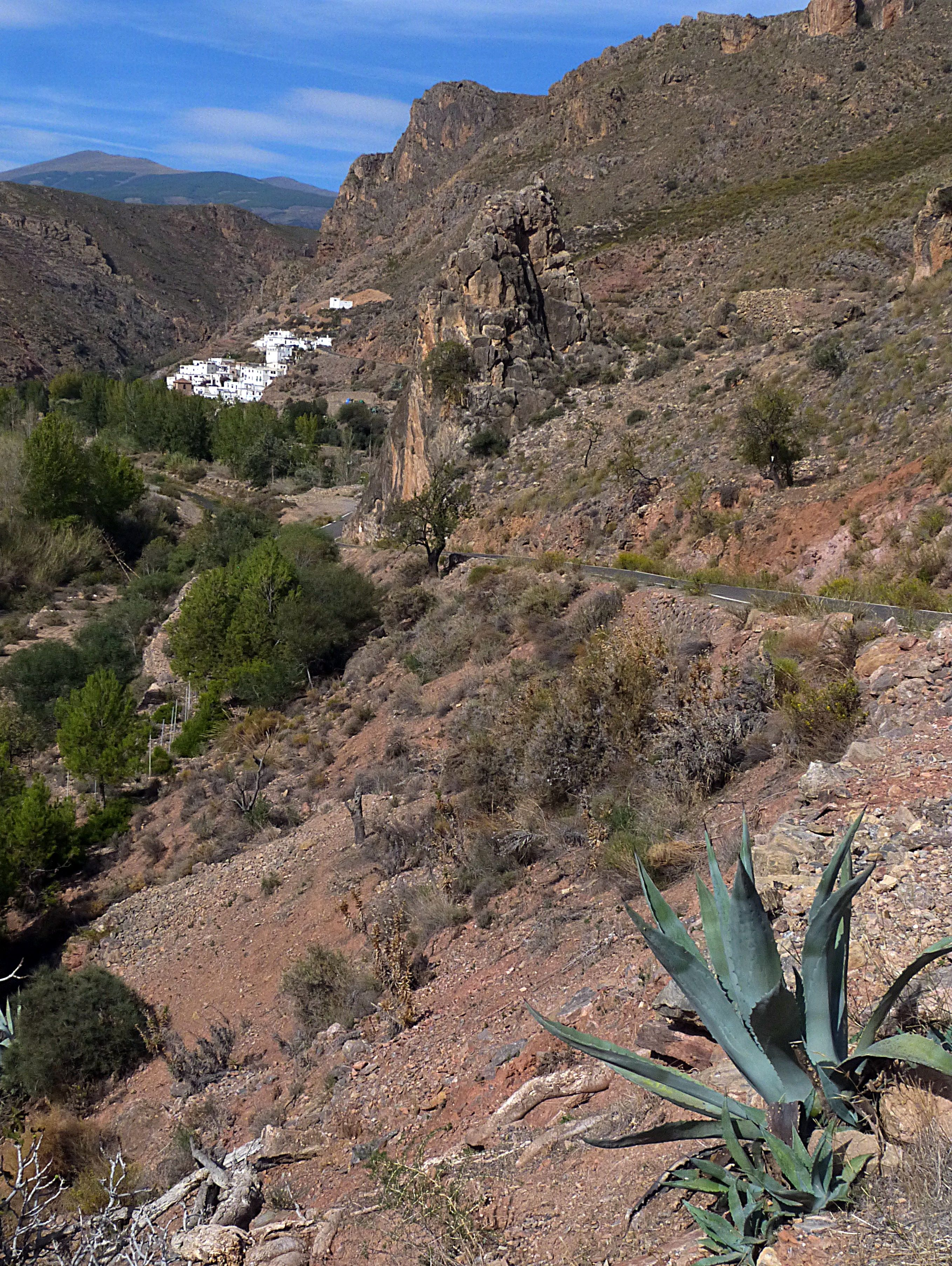 Darrícal am Embalse de Benínar